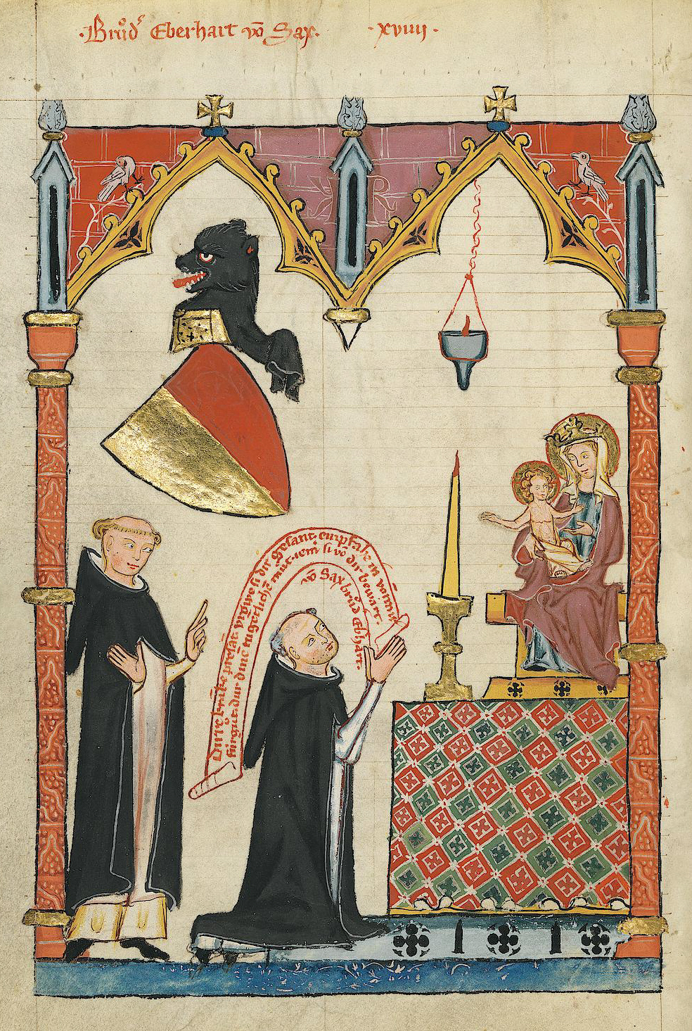 Codex Manesse, UB Heidelberg, Cod. Pal. germ. 848, fol. 48v: Bruder Eberhard von Sax